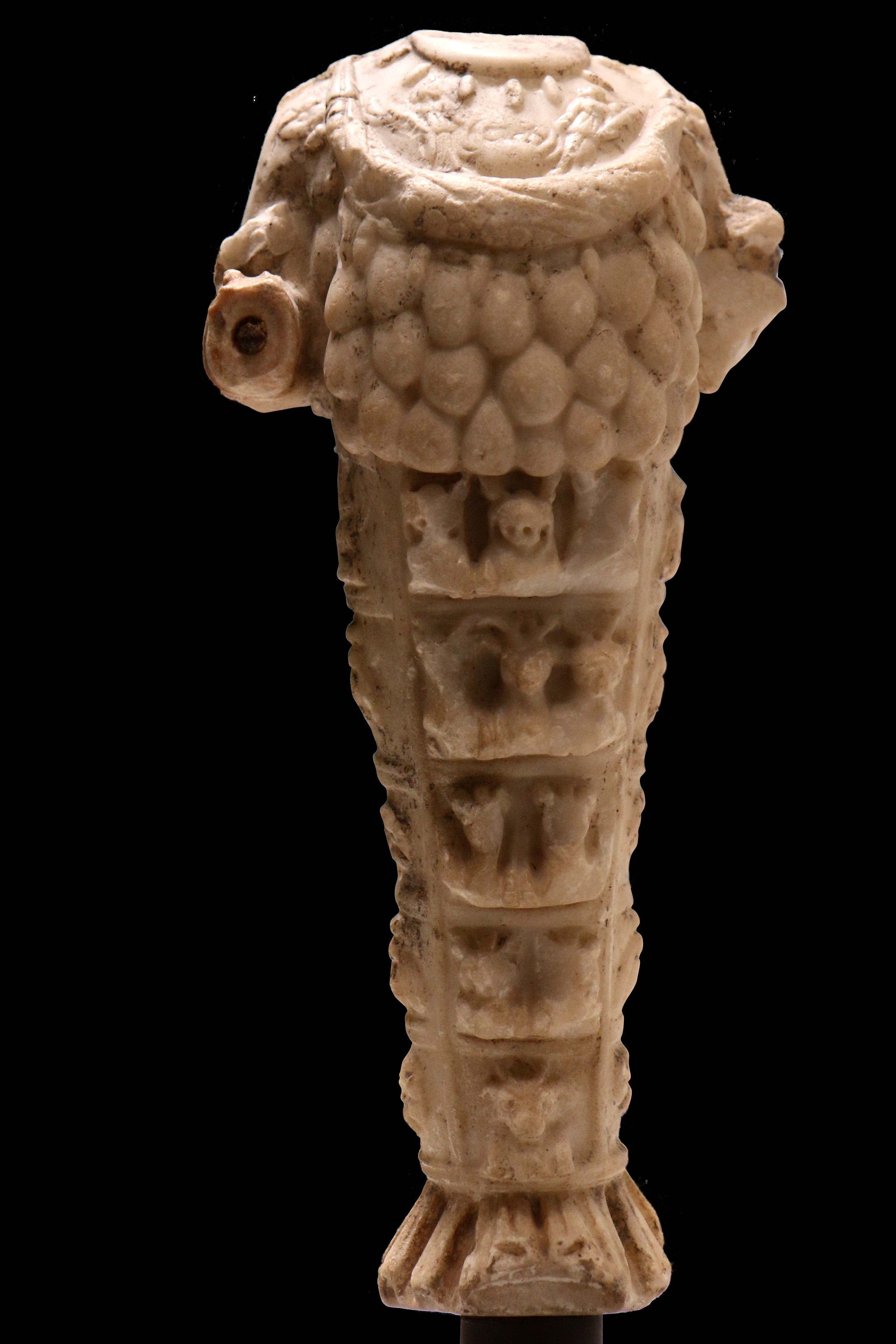 Statuette en marbre de la déesse Artémis au musée d'histoire de Marseille.